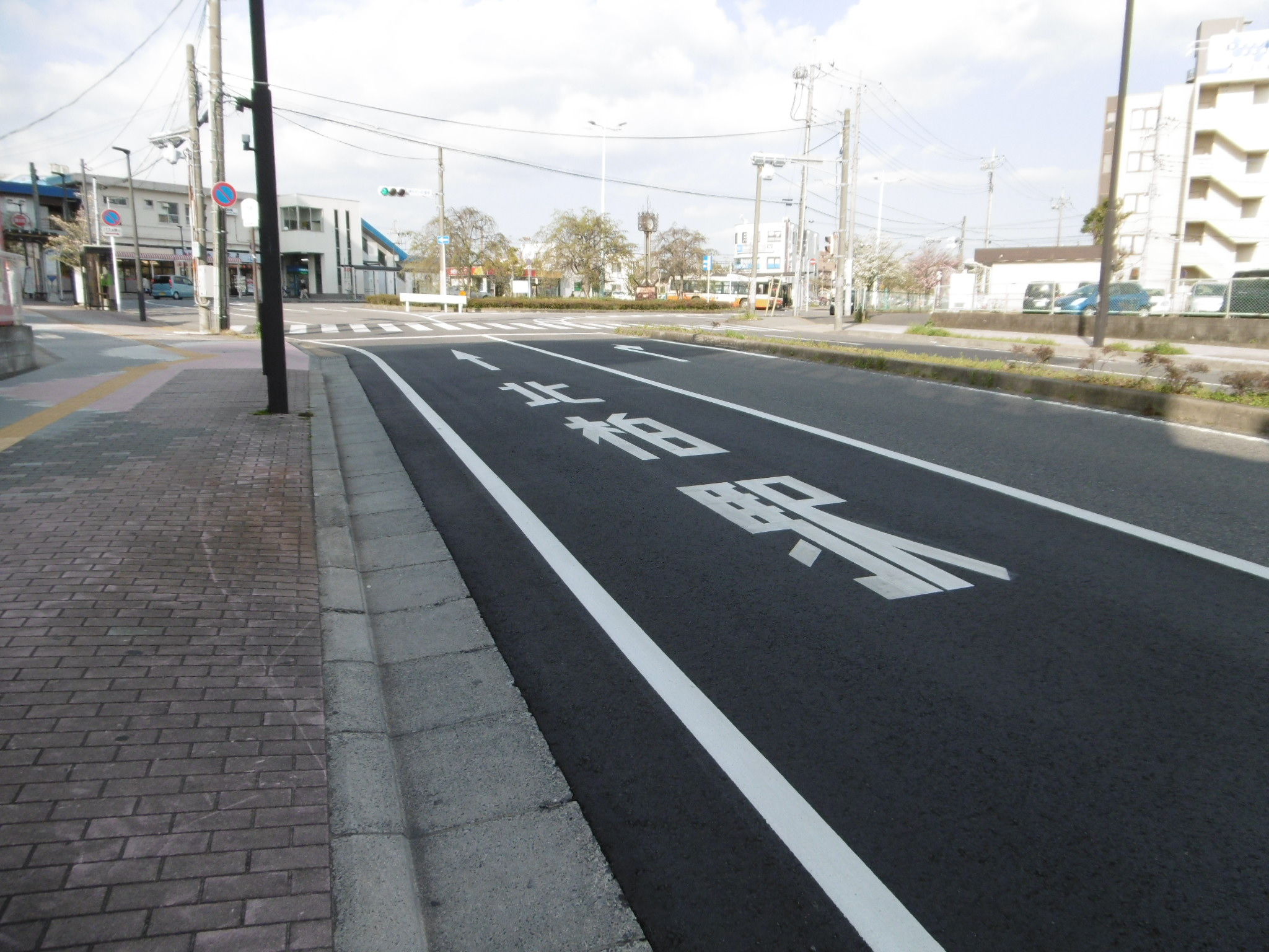 千葉県柏市のＪＲ常磐線各駅停車が止まる北柏駅から導く千葉県道268号北柏停車場線の起点側。